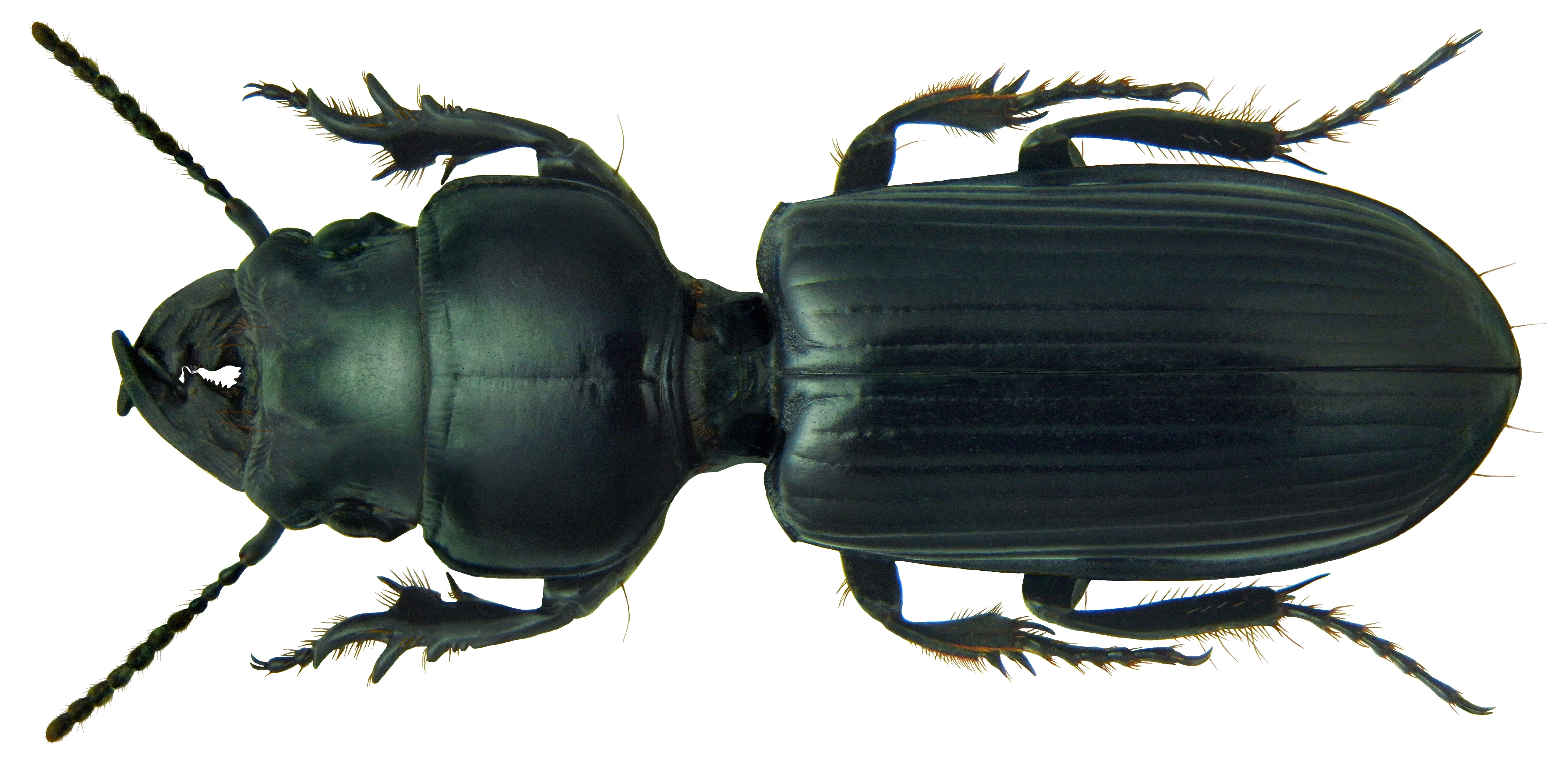 Familie: Carabidae Groesse: 35 mm Fundort: Namibia, Omaruru, 1200 m leg. U.Schmidt, 1994; det. P.Bulirsch, 2010 Photo: U.Schmidt, 2011